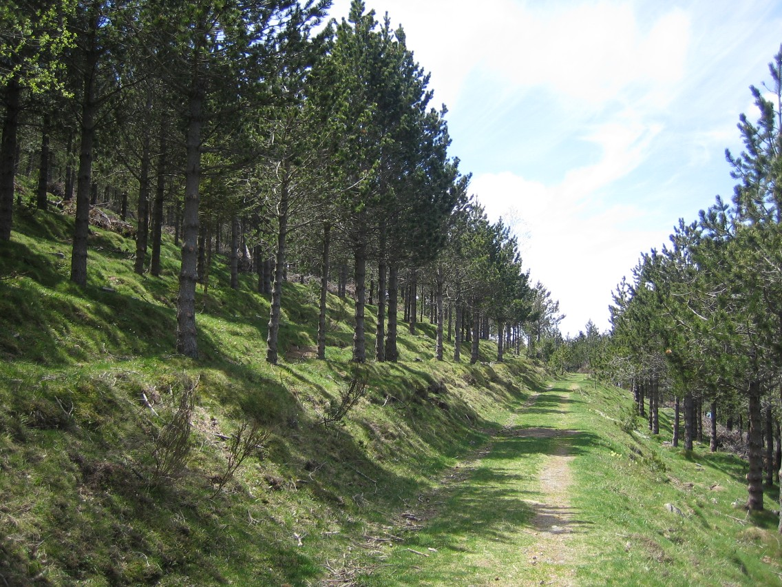 Tractaments silvícoles a la muntanya de Molló